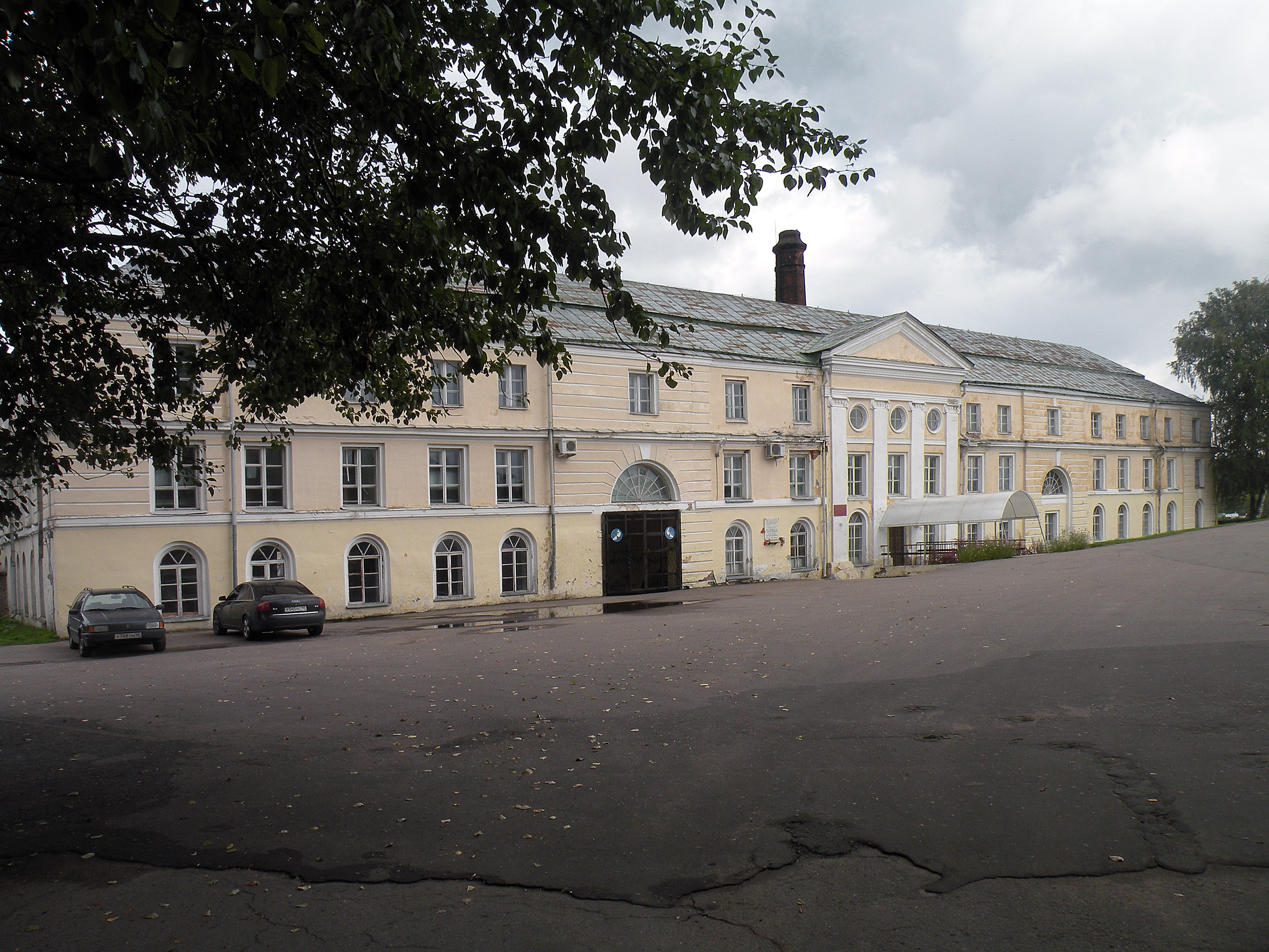 Фельтен Юрий Матвеевич (1730-1801) Бывшая бумажная фабрика в Ропше